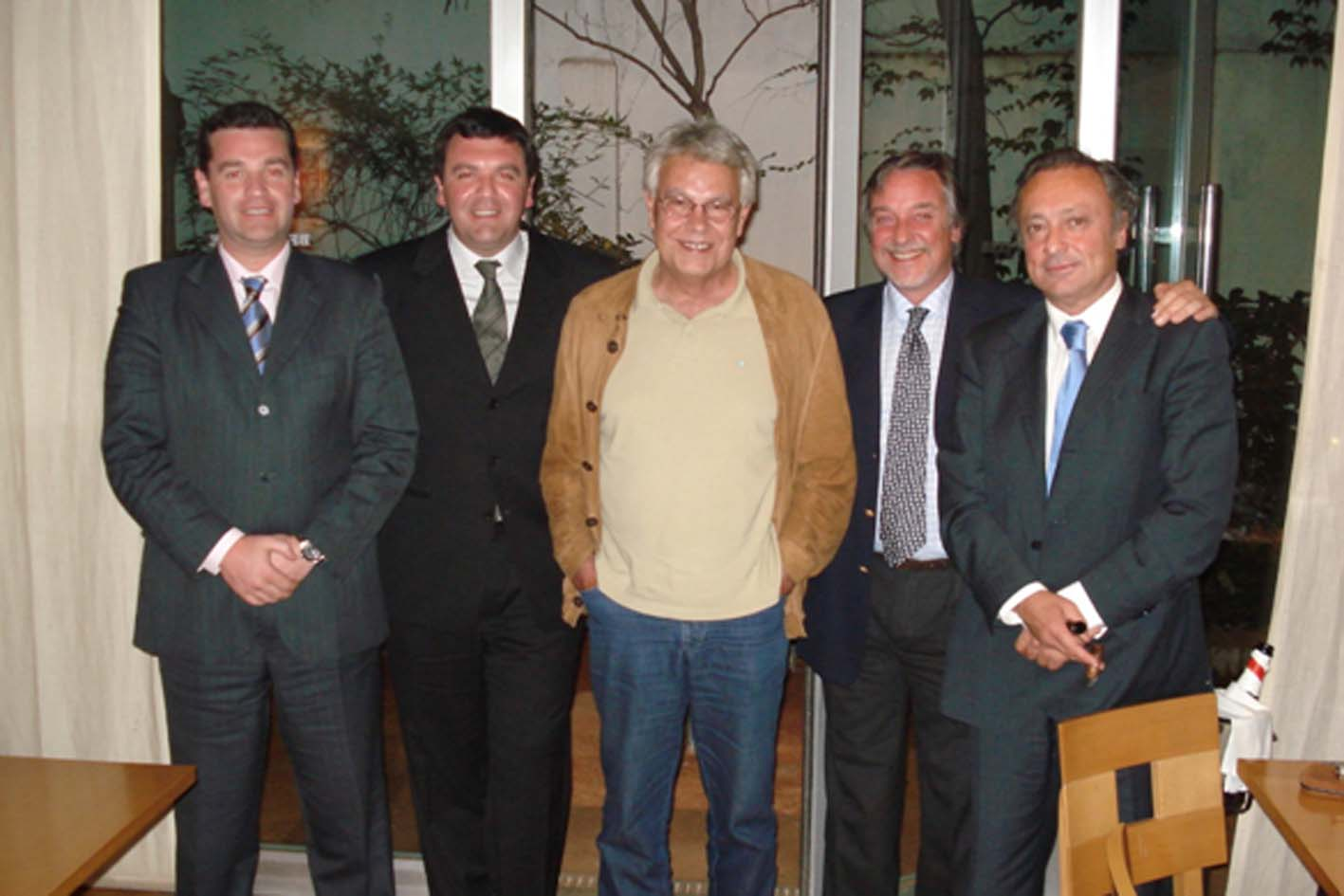 En España, en el Simposio de Justicia y DDHH, Tribunal Penal Internacional. De Izquierda a derecha: Alfredo Lijo, Ariel Lijo, Felipe Gonzalez, Gabriel Cavallo y Carlos Bettini, embajador argentino en España.